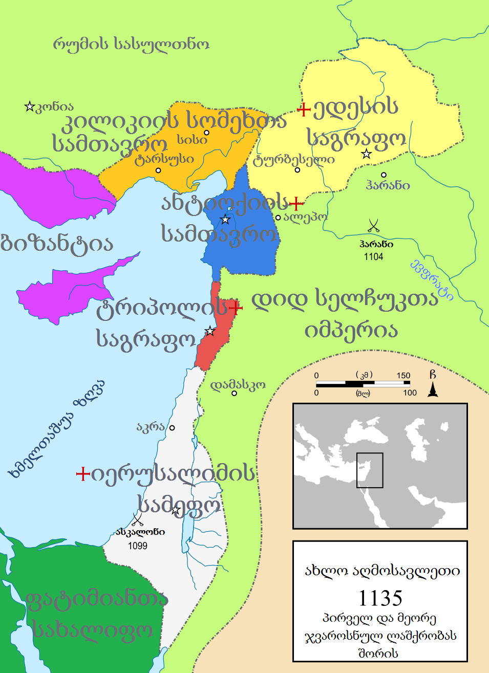 ახლო აღმოსავლეთი 1135 წელს